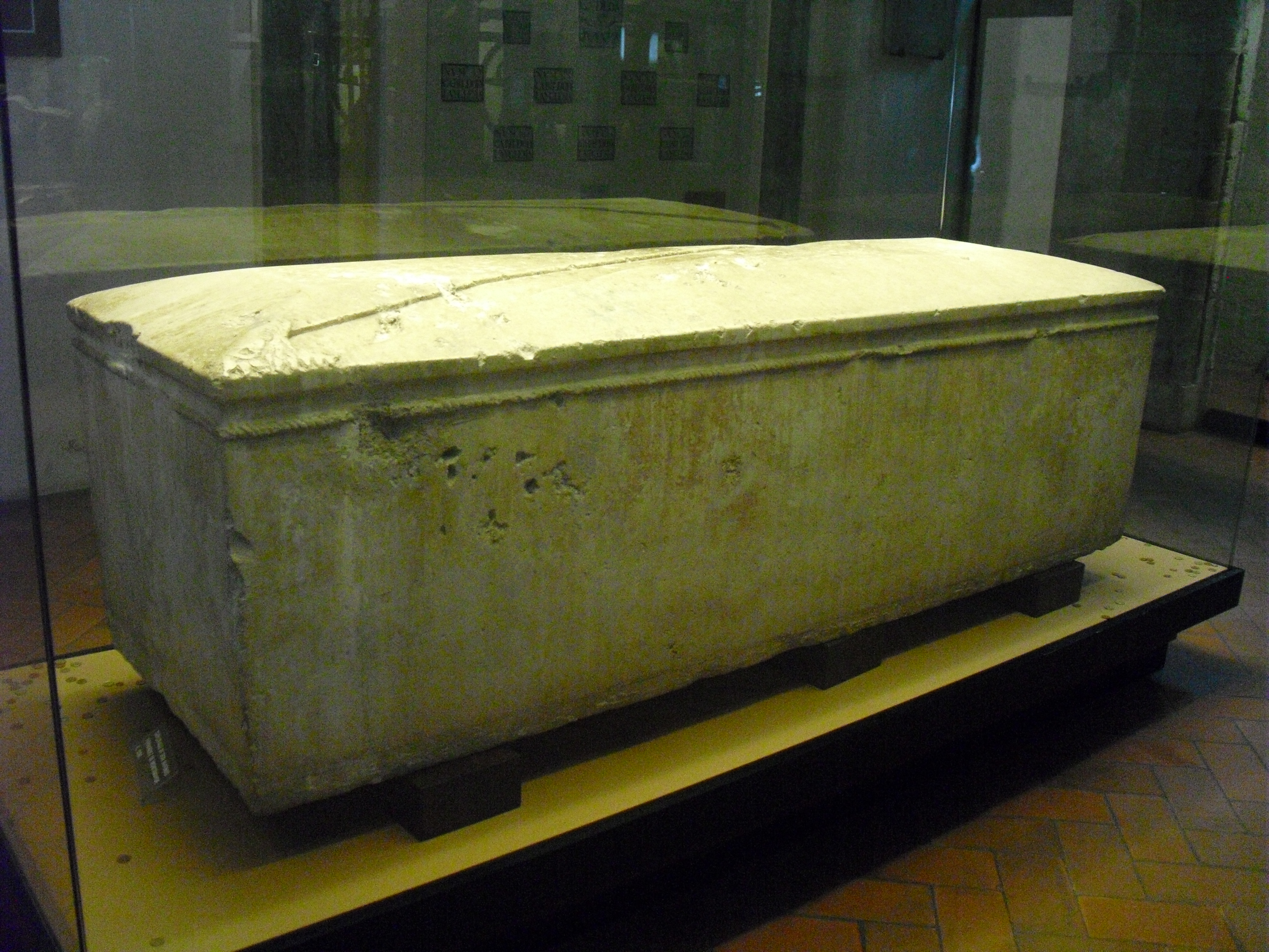 Sarcófago de Alfonso Fernández de Montemayor. Circa 1390. Museo de San Clemente de la Mezquita-catedral de Córdoba, Córdoba (España).